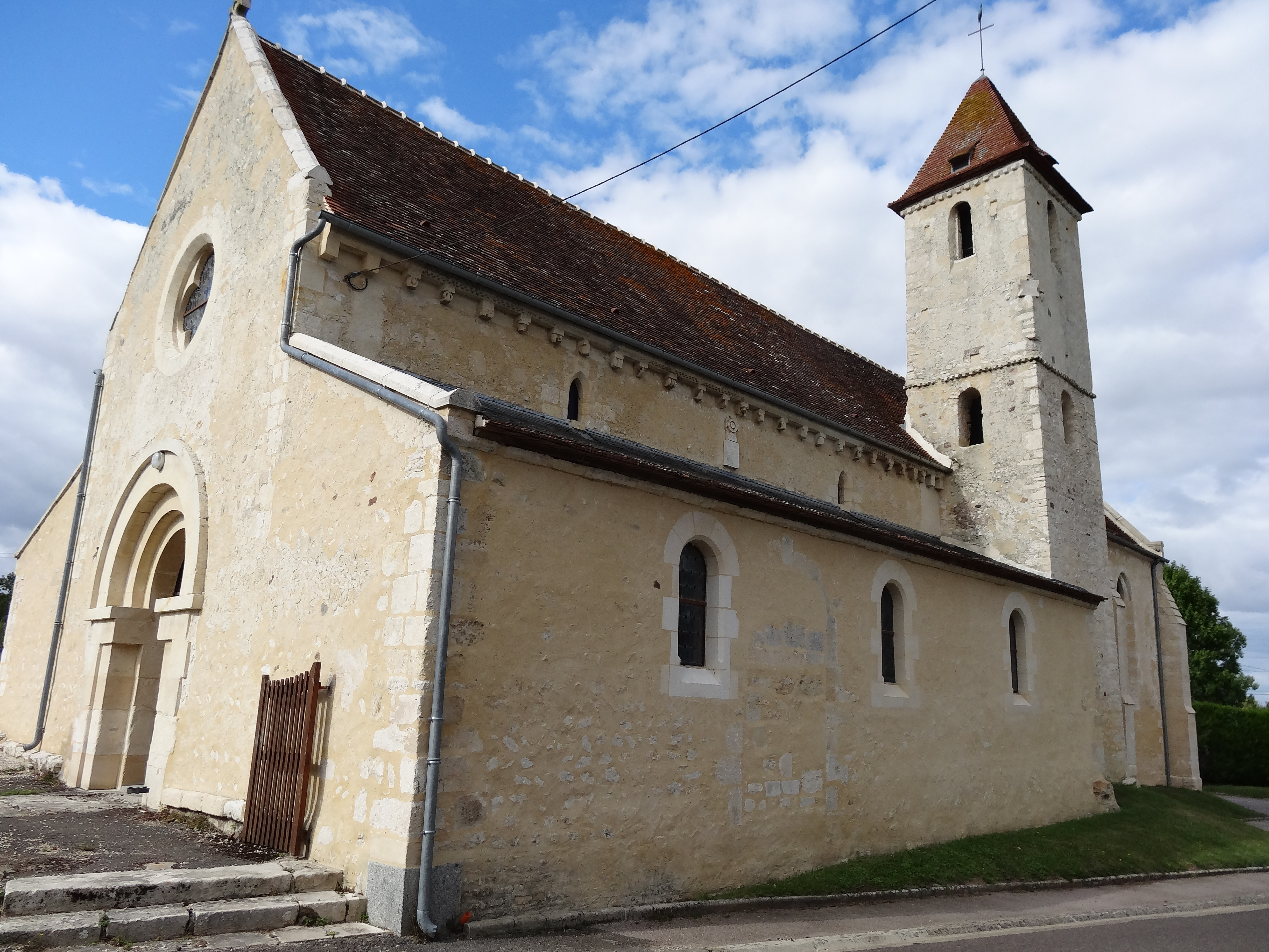 Sentilly (Orne) façade occidentale et façade sud de la nef de l'église